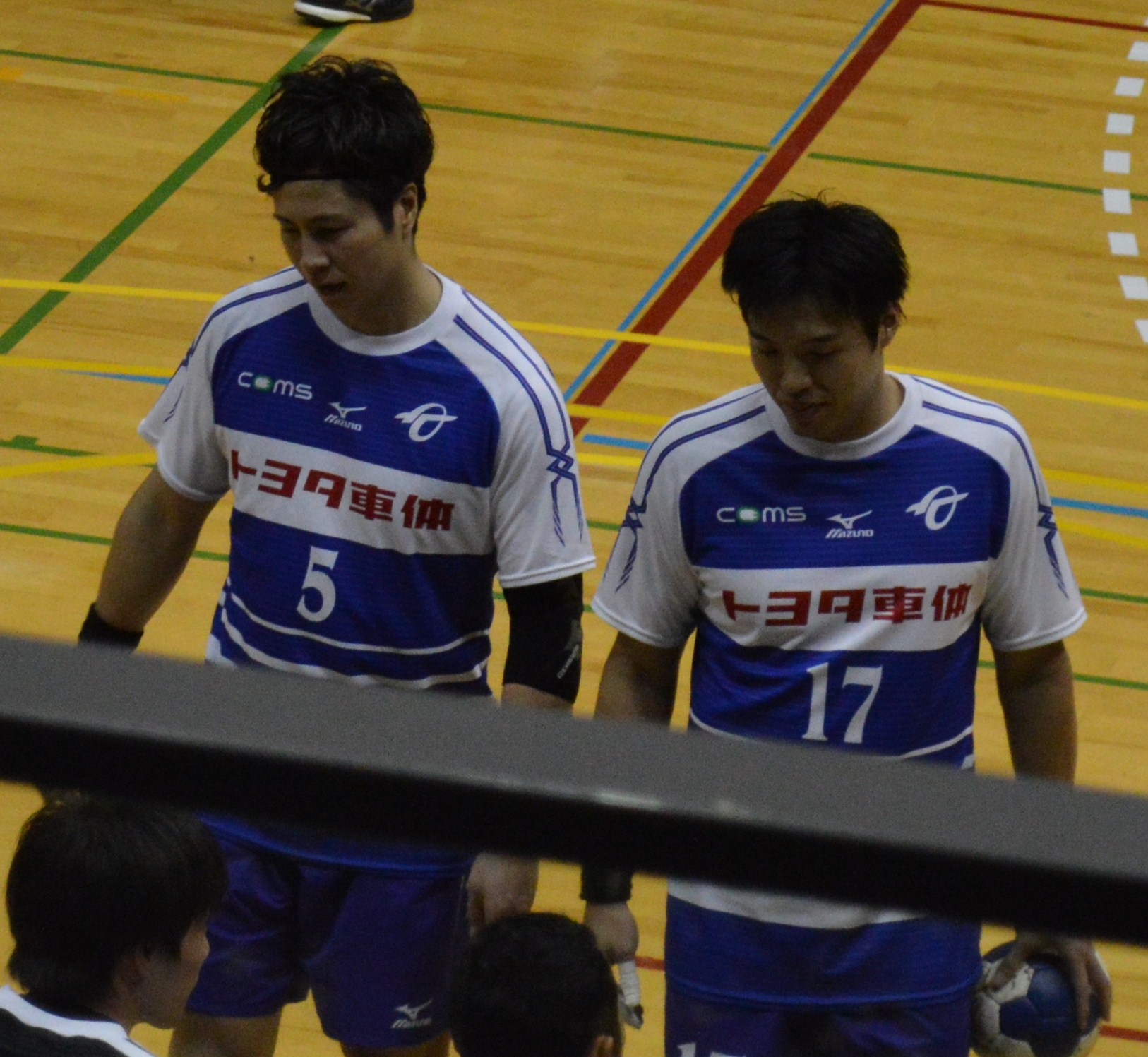 日本ハンドボールリーグ2015-16 トヨタ車体ブレイブキングス、高智海吏(5)、香川将之(17)